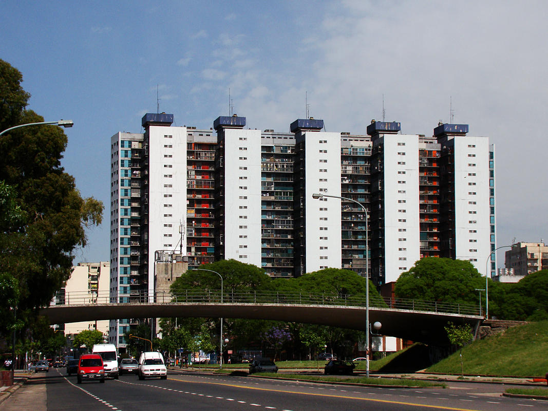 Torres de Matheu en el barrio de Parque Patricios, ciudad de Buenos Aires, Argentina. Toma realizada desde avenida Brasil.